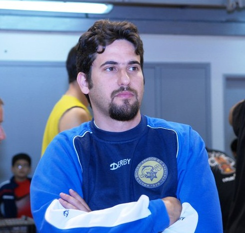 שי האוזמן - פרשן כדורסל, שחקן עבר ומנהל מקצועי במכבי אשדוד